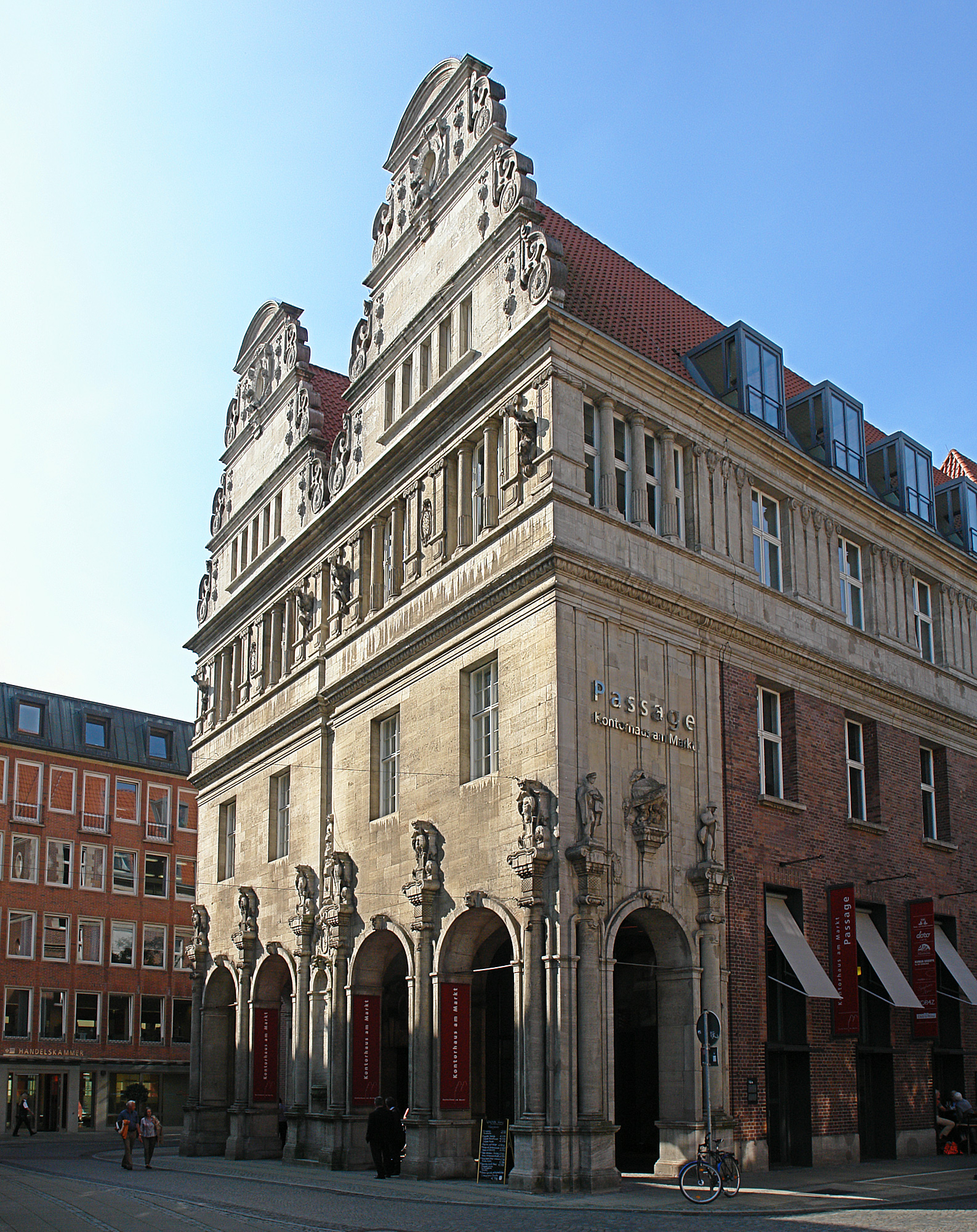 Disconto-Bank, Passage - Kontorhaus am Markt in Bremen, Langenstraße 2. Das abgebildete Objekt ist ein geschütztes Kulturdenkmal in der Freien Hansestadt Bremen, mit der Nr. 0830 beim Landesamt für Denkmalpflege registriert.